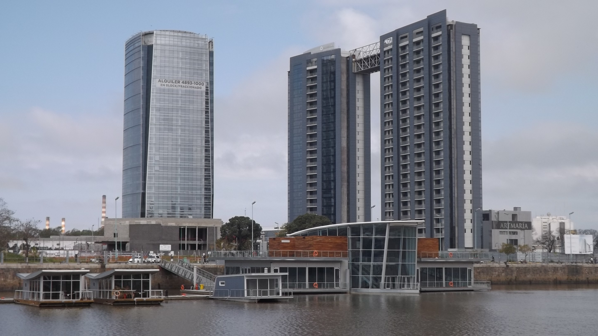 Madero Harbour and Art María buildings. Puerto Madero, Buenos Aires.